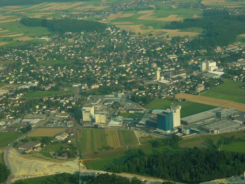 Die Ortschaft Herzogenbuchsee aus der Luft fotografiert